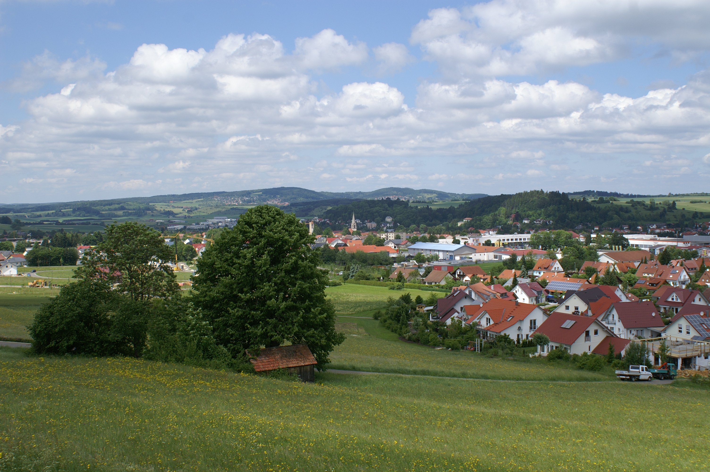 Münsingen (Württemberg) liegt auf der hügeligen Kuppenalb im Zentrum des Biosphärengebietes Schwäbische Alb.